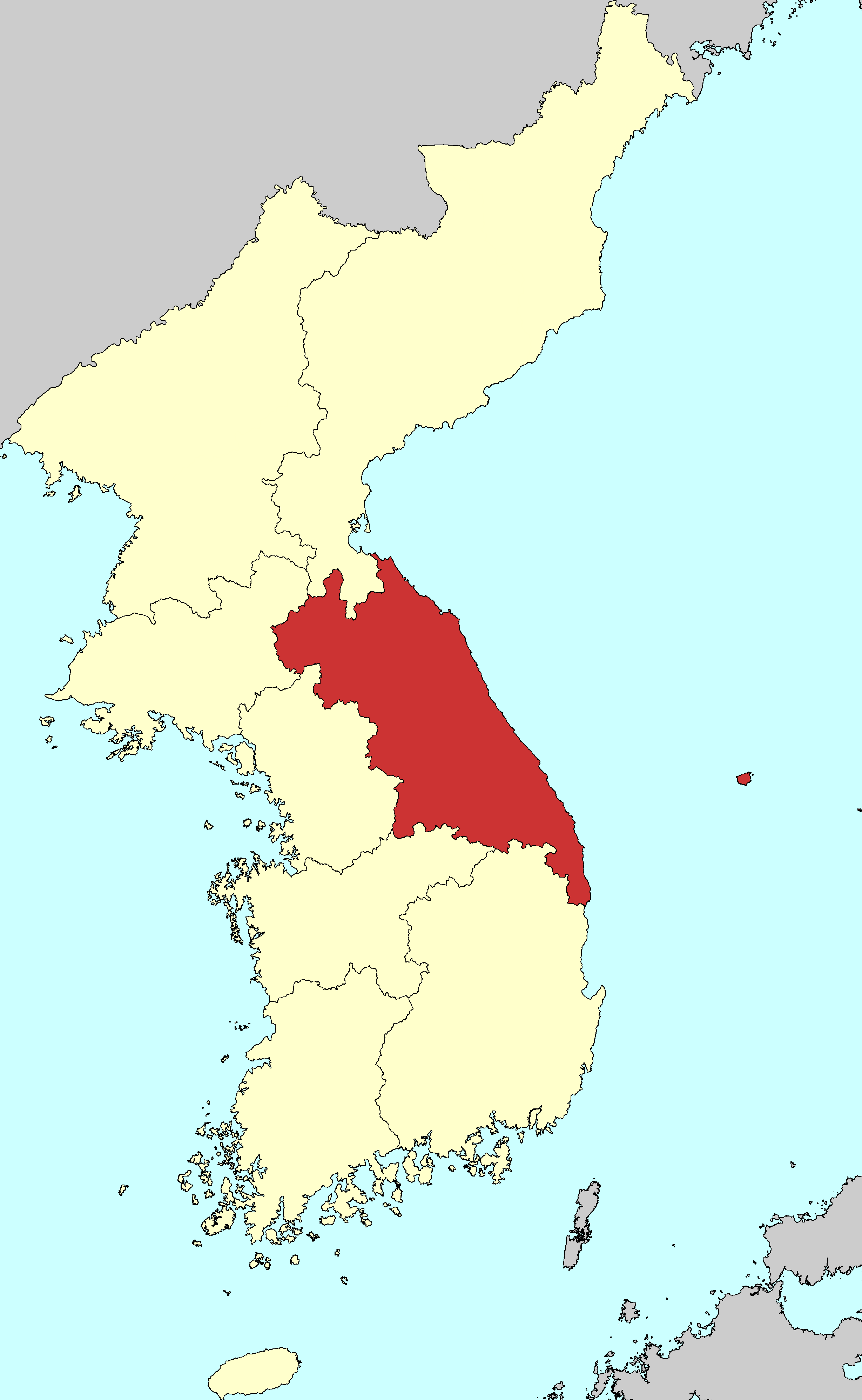 조선 후기 강원도